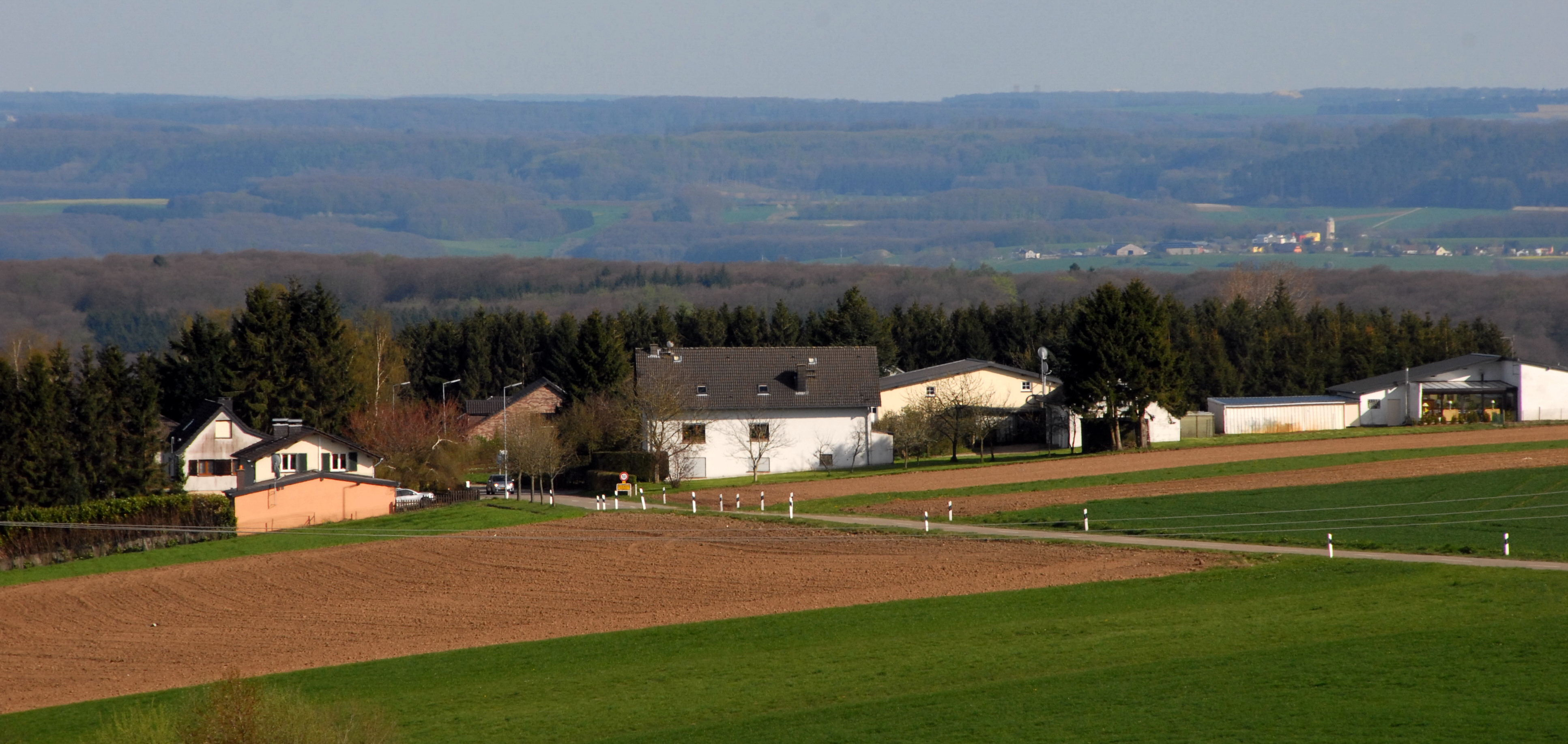 Vue op Foulscht vu Rammerech aus gesinn.